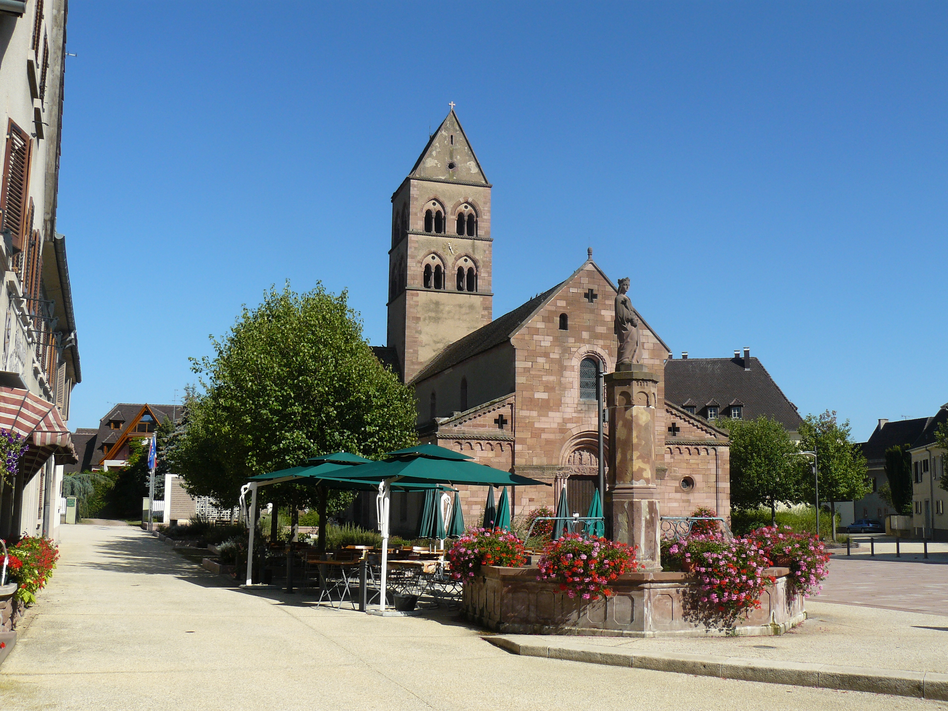 Église Saint-Pierre et Saint-Paul